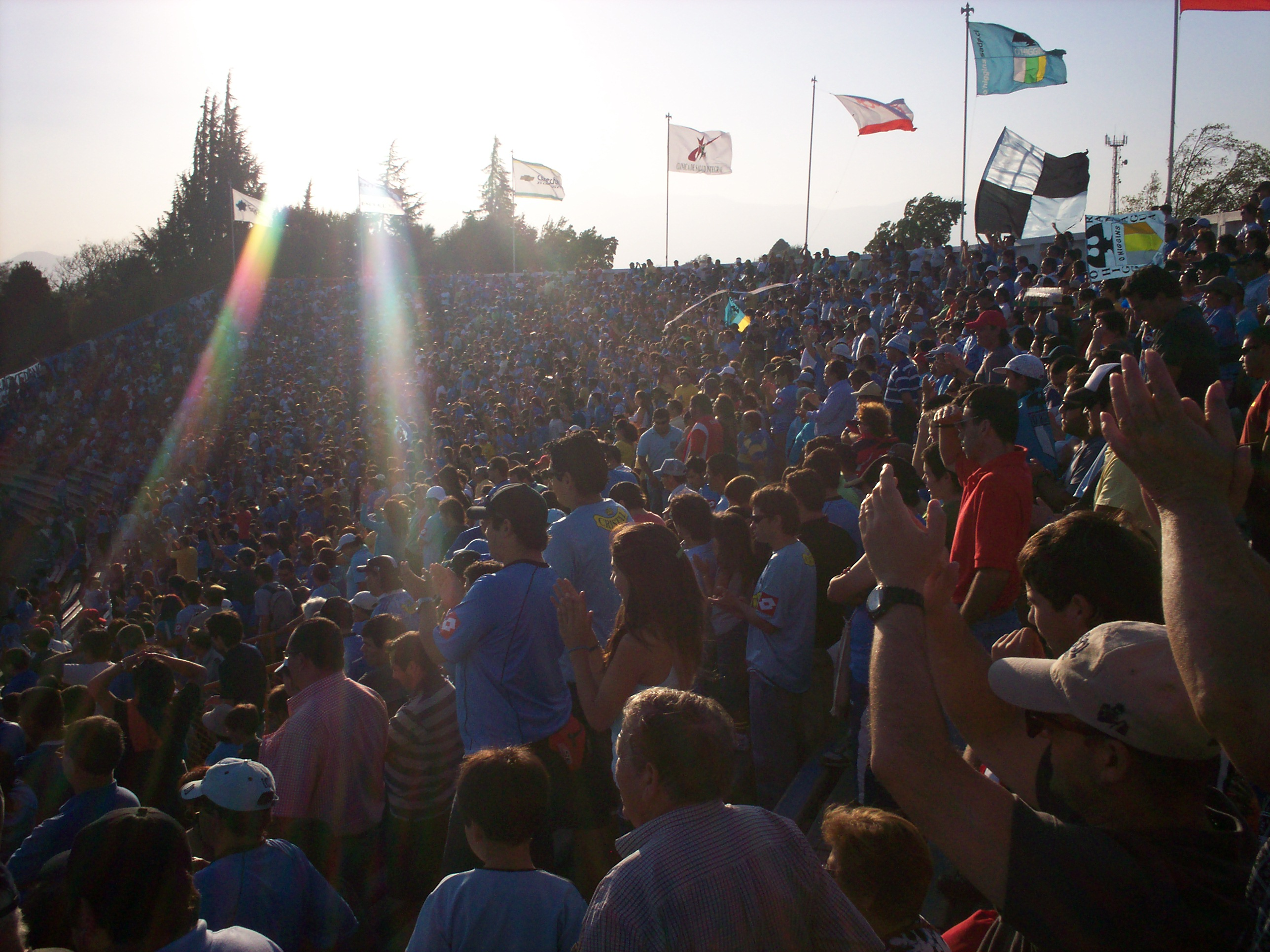 Angostura